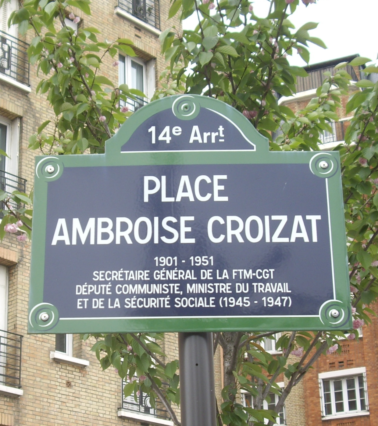 Place Ambroise-Croizat, Paris 14e. « Ambroise Croizat, 1901-1951, secrétaire général de la FTM-CGT, député communiste, ministre du Travail et de la Sécurité sociale (1945-1947). »